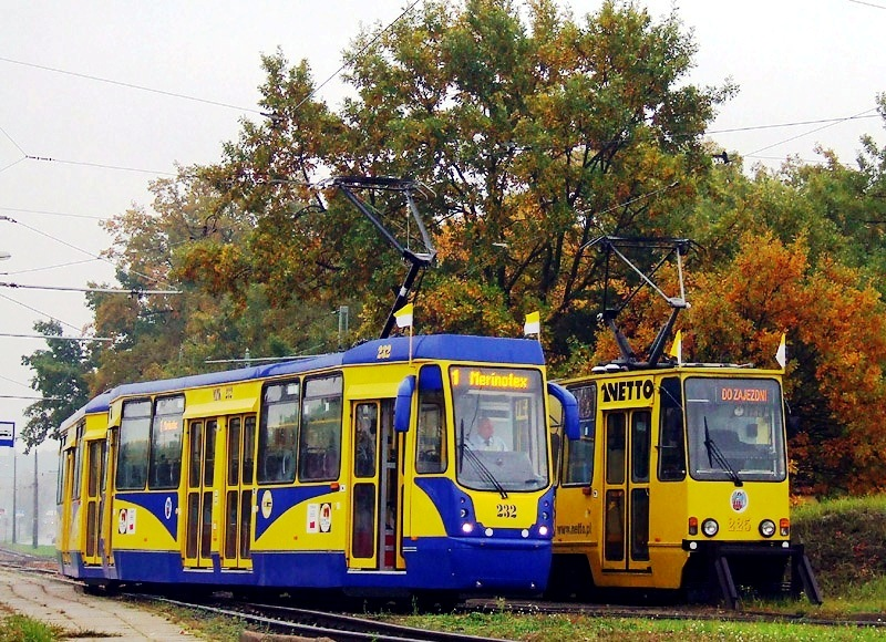 Toruńskie tramwaje Konstal 805 Na, jeden zmodernizowany w roku 2007, drugi natomiast w latach 90.